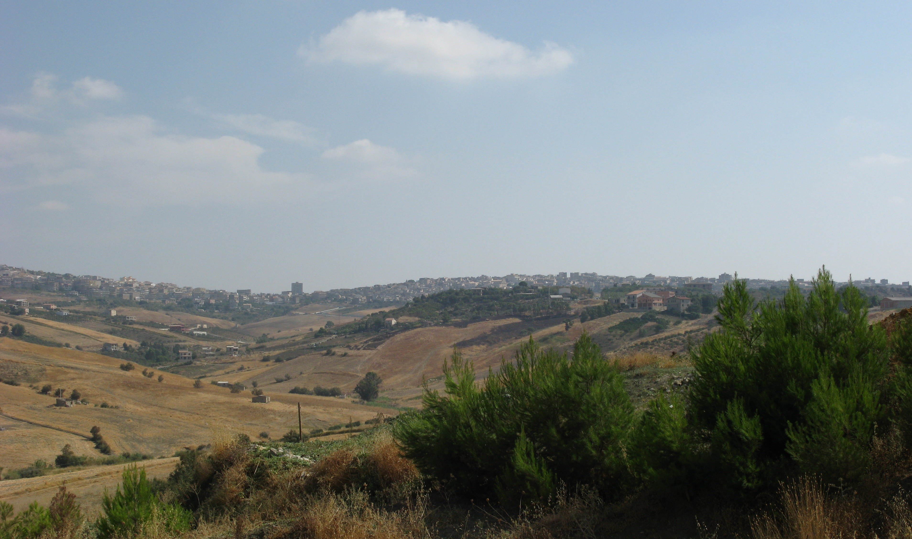 Panorama di Raffadali.